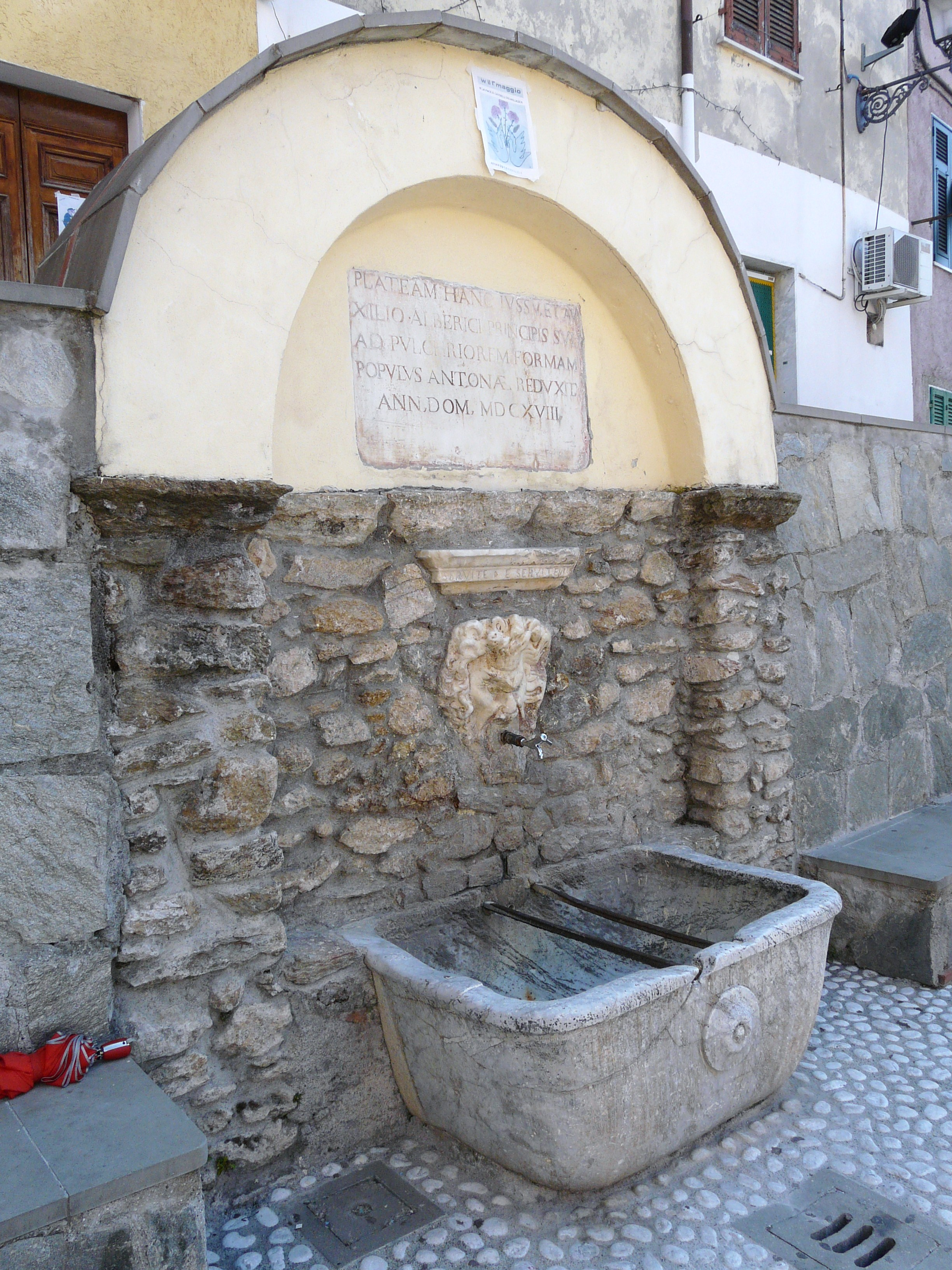 Fontana di Piazza San Rocco, Antona, Massa, Toscana, Italia